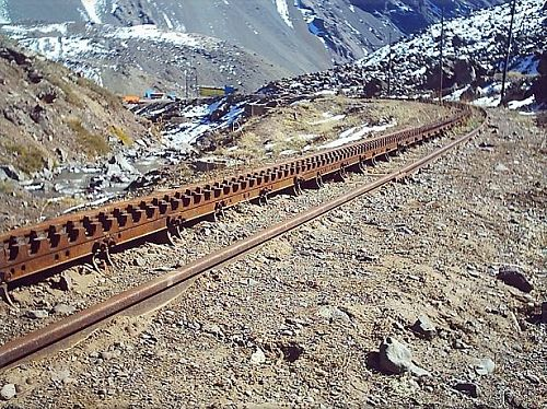 Via ferrea con cremallera del Trasandino Los Andes - Mendoza